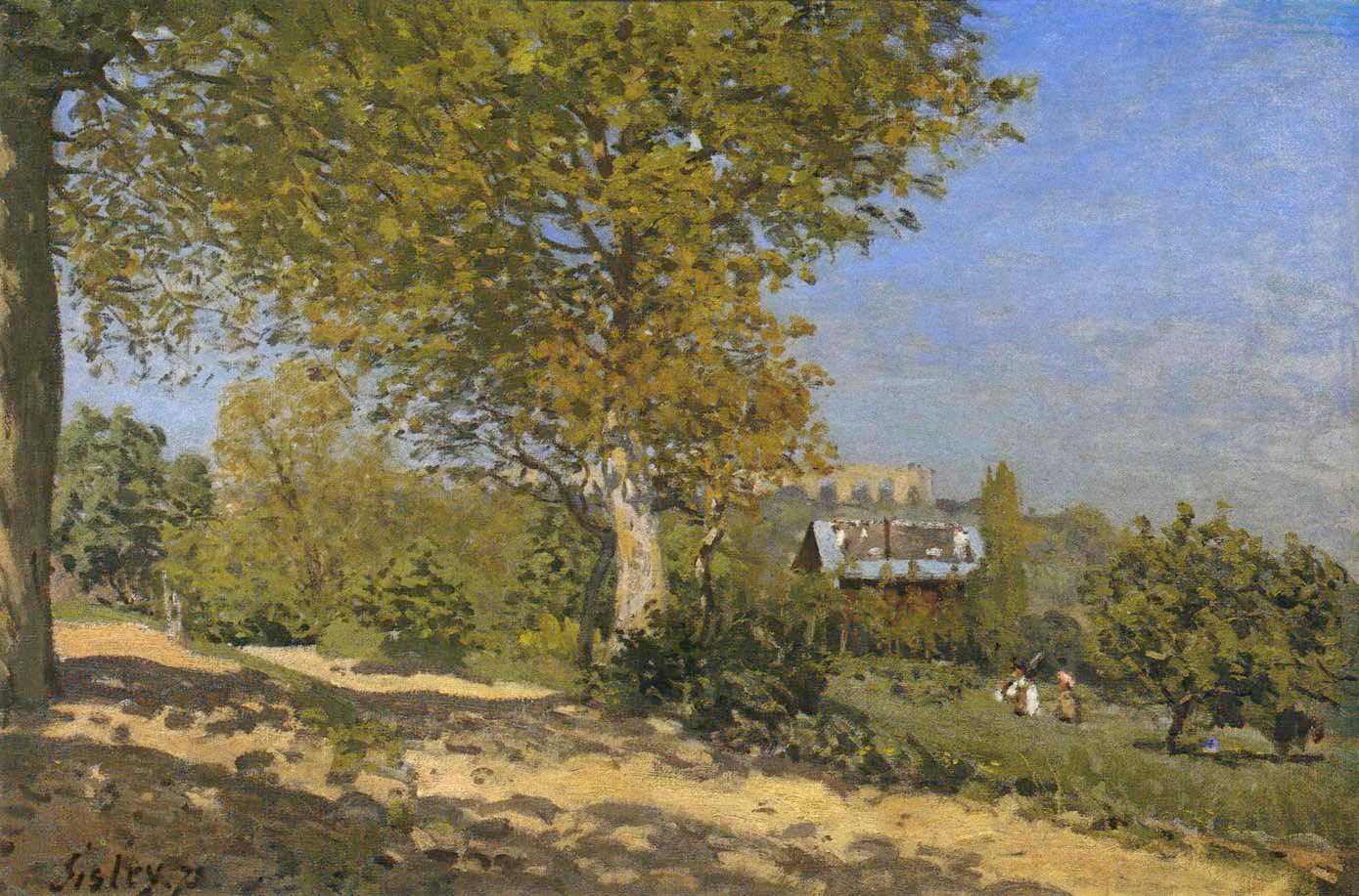 Environs de Louveciennestitle QS:P1476,fr:"Environs de Louveciennes" label QS:Lfr,"Environs de Louveciennes"